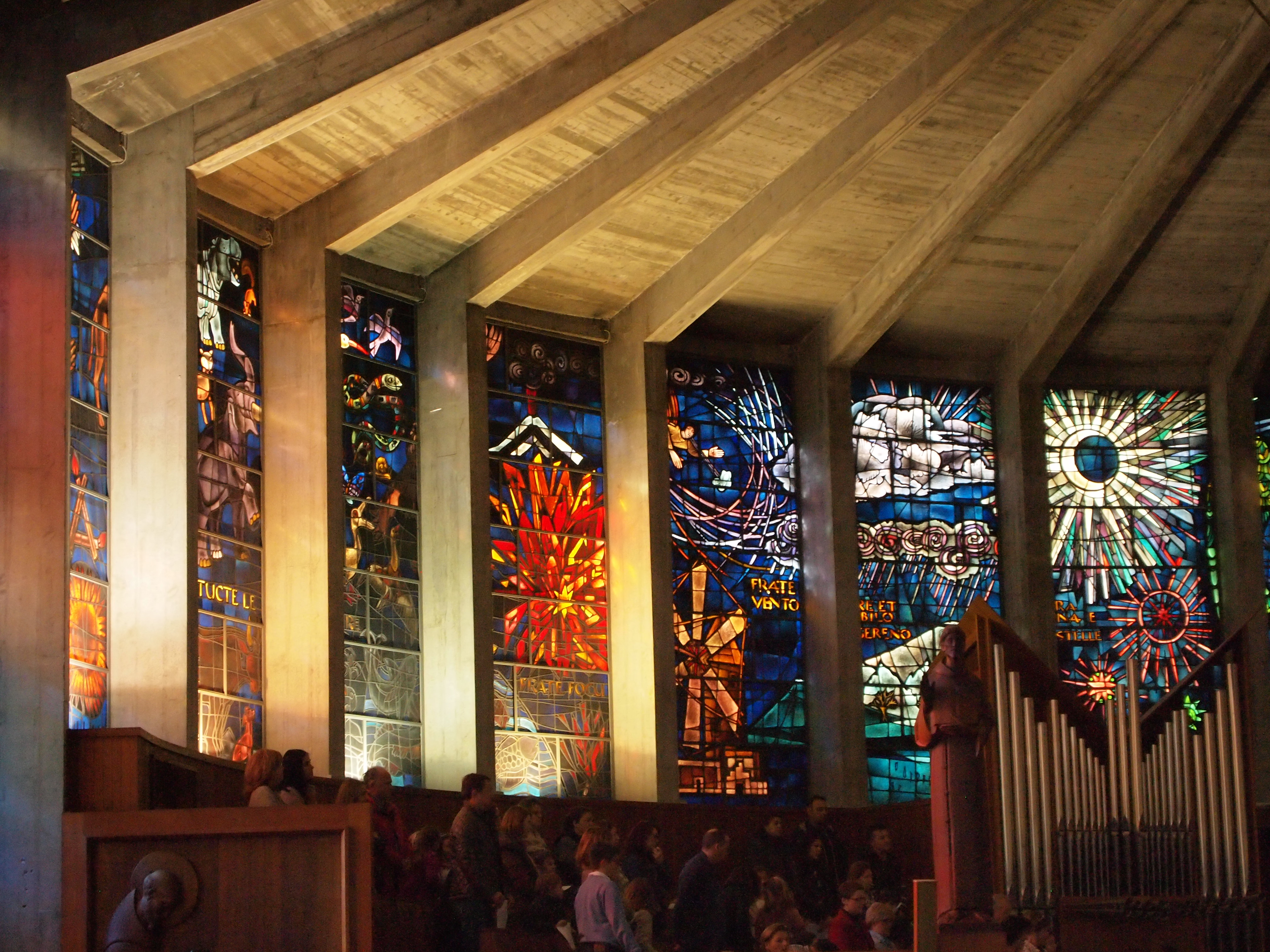 Església de Nostra Senyora dels Àngels de la Porciúncula, a Palma (Mallorca). Vitralls